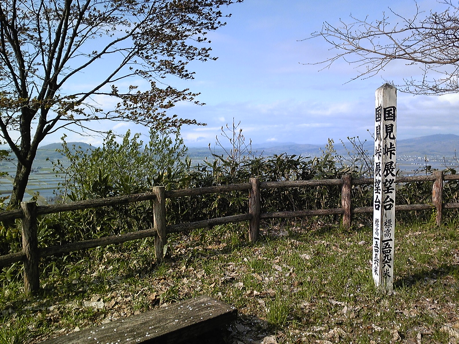 北海道深川市国見峠の展望台